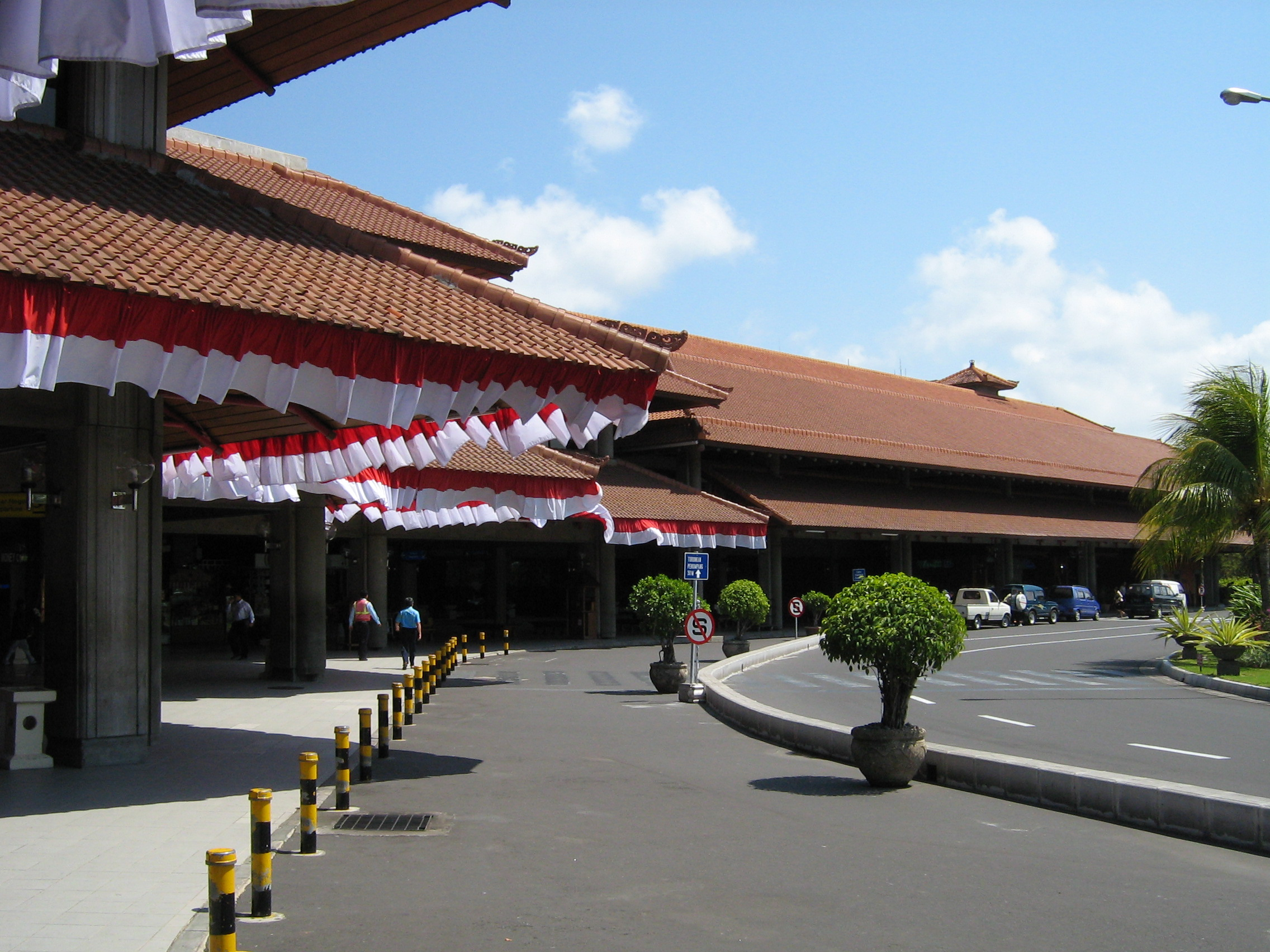 Anfahrtsstraße des Internationalen Terminals am Denpasar Airport